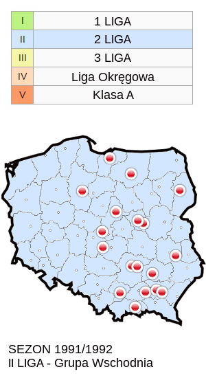 Jagiellonia w sezonie 1991/92 mapa